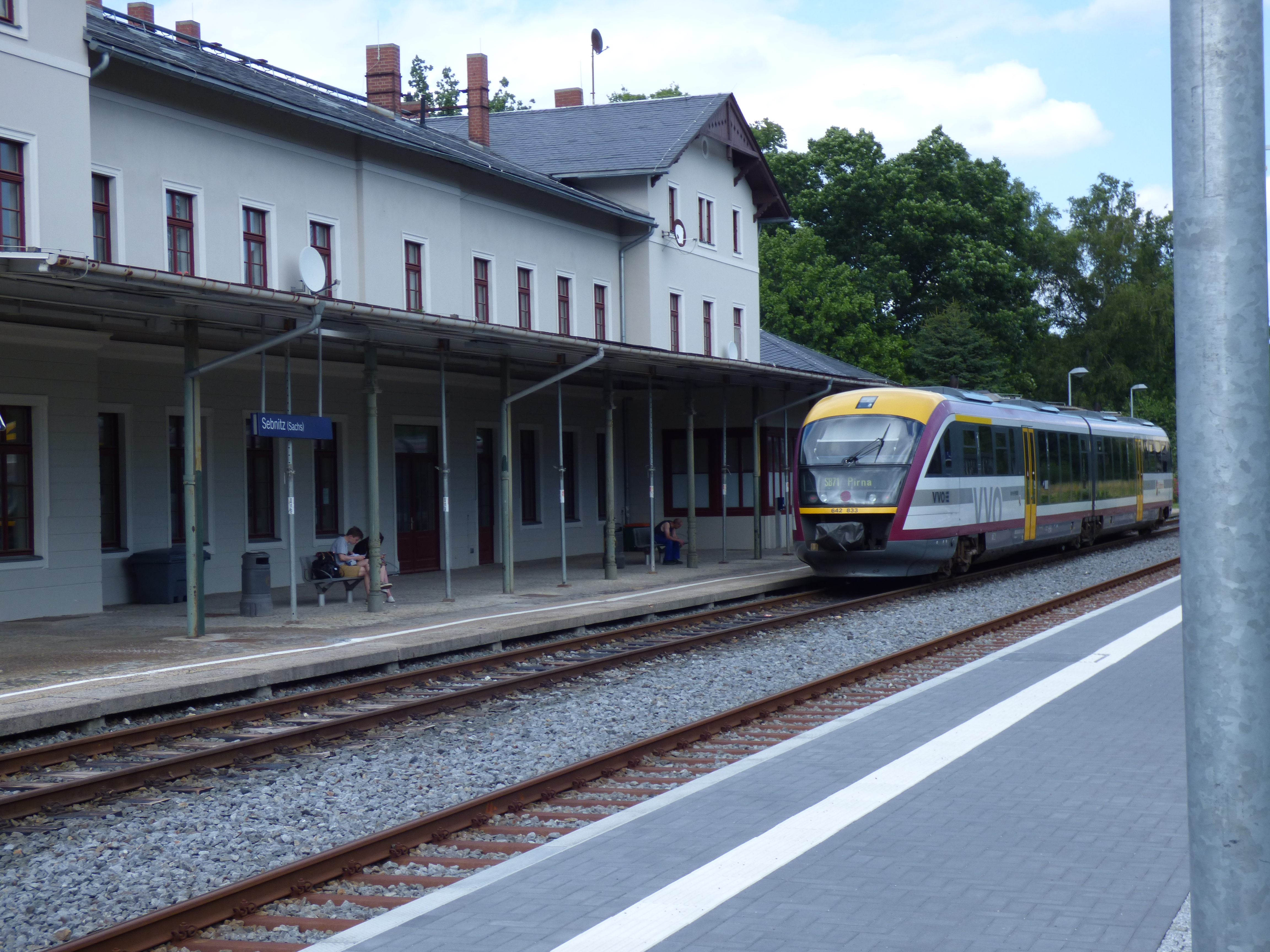 Sebnitz Bahnhof, Sebnitz nádraží